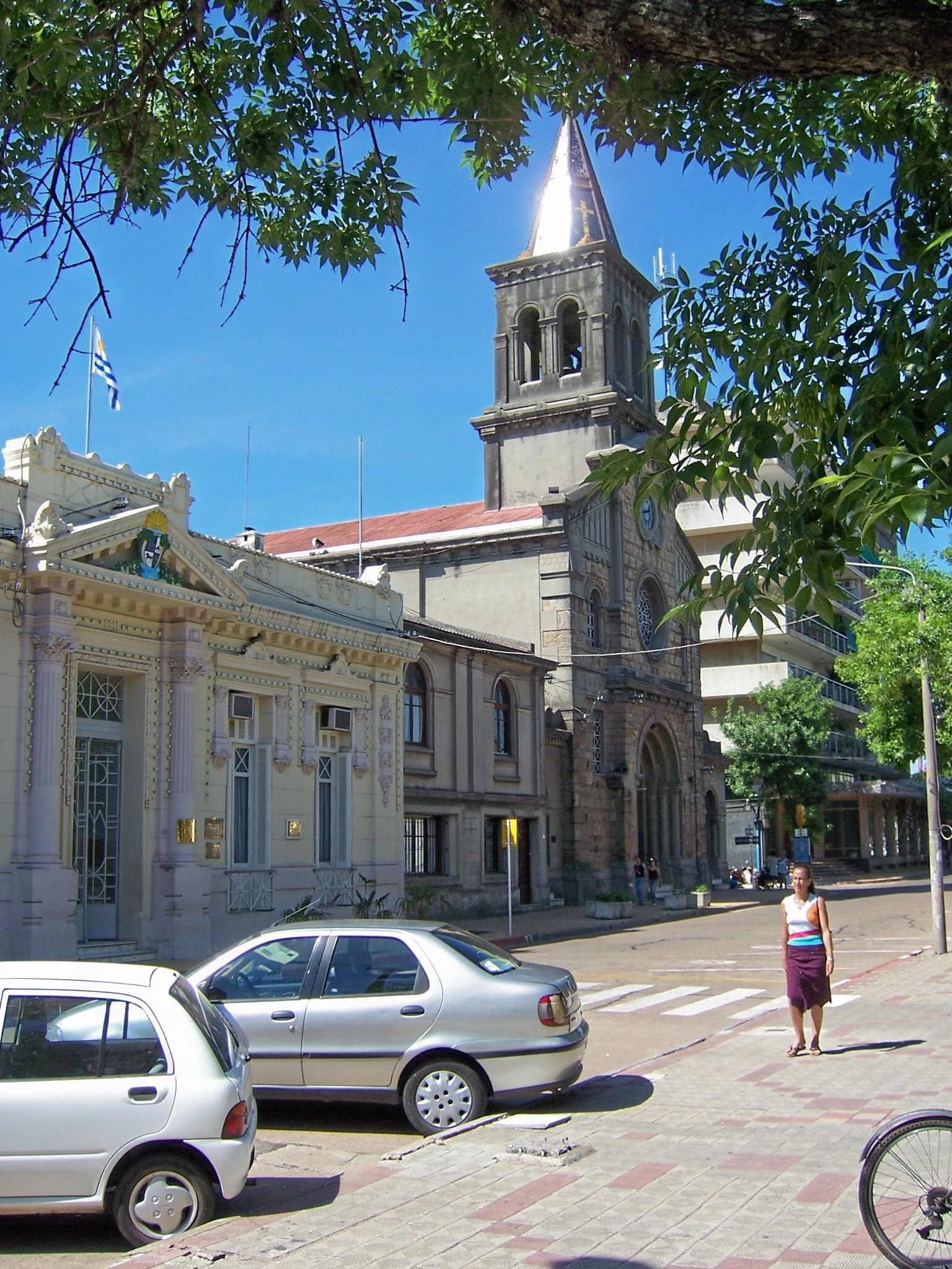 Fachadas de la Intendencia Municipal y de la iglesia principal, ciudad de Tacuarembó, Uruguay. Foto tomada por --Tano4595 12:41, 25 November 2005 (UTC) en noviembre de 2005. Estos edificios se encuentran sobre la calle principal, 18 de Julio, frente a la Plaza Artigas.